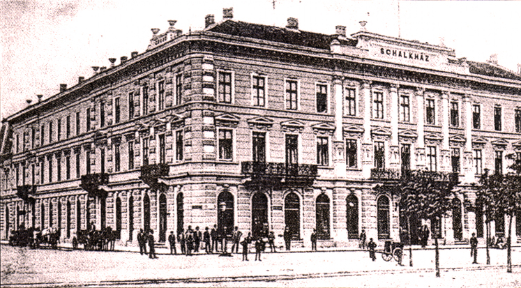 Bývalý hotel Schalkház v Košiciach